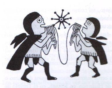 Representacion de Siku, músicos Moche enfrentados ejecutando zampoñas bipolares unidas mediante cuerda (antiguedad: 1700-1800 años)